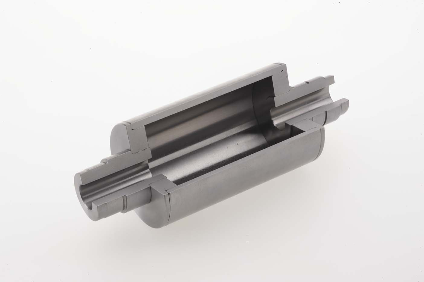 Schnittmodell gebaute Rotorwelle